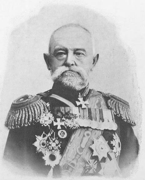 Gen. Nikolai Petrovich Linevitch